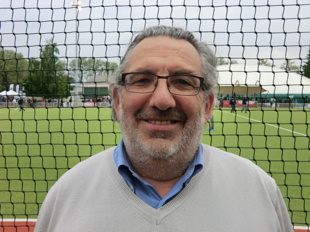 Pierre Roussel en marge de la finale du championnat de France 2013 à Caluire-et-Cuire.